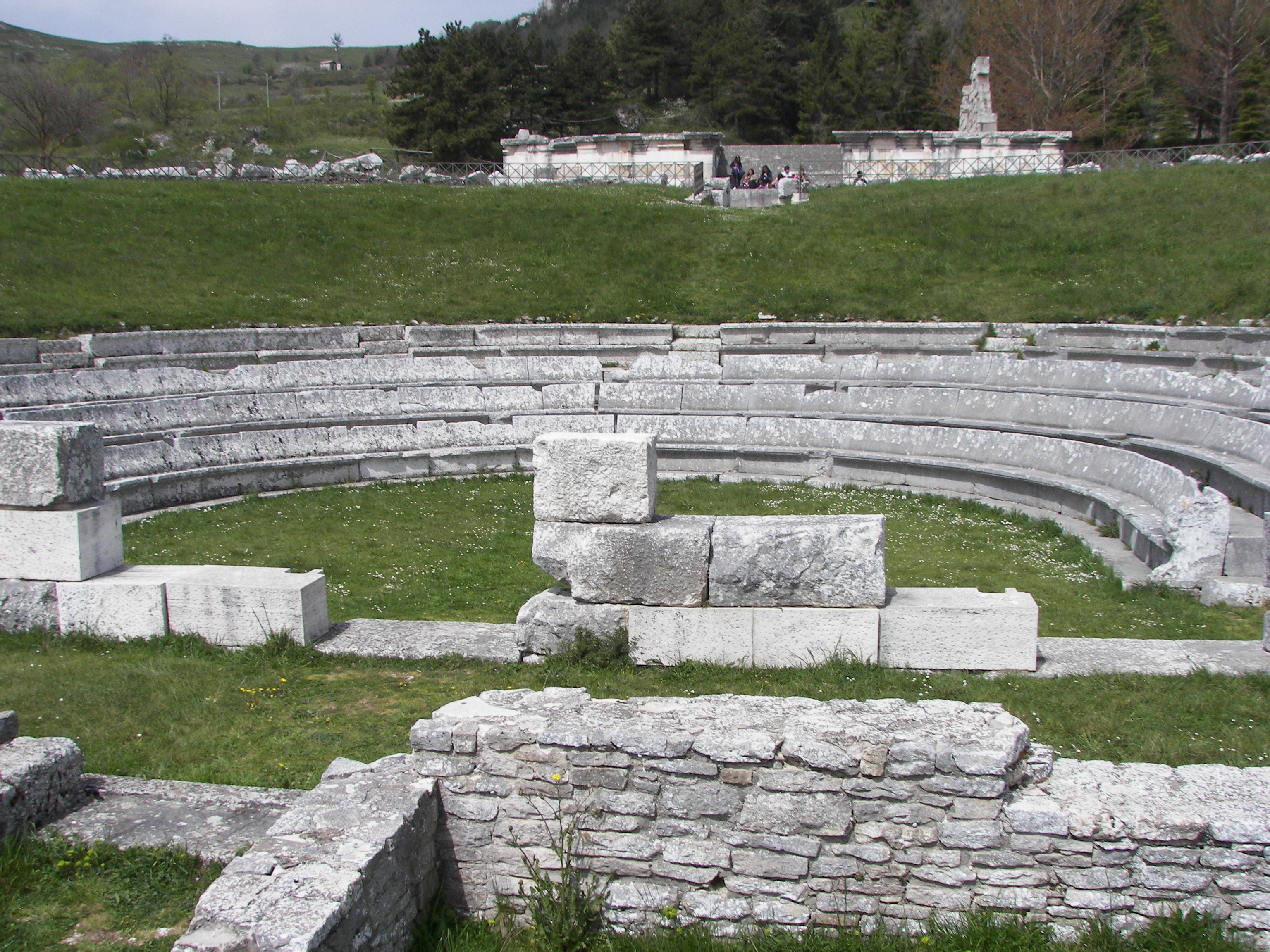 Sito archelogico sannita di Pietrabondante (IS)